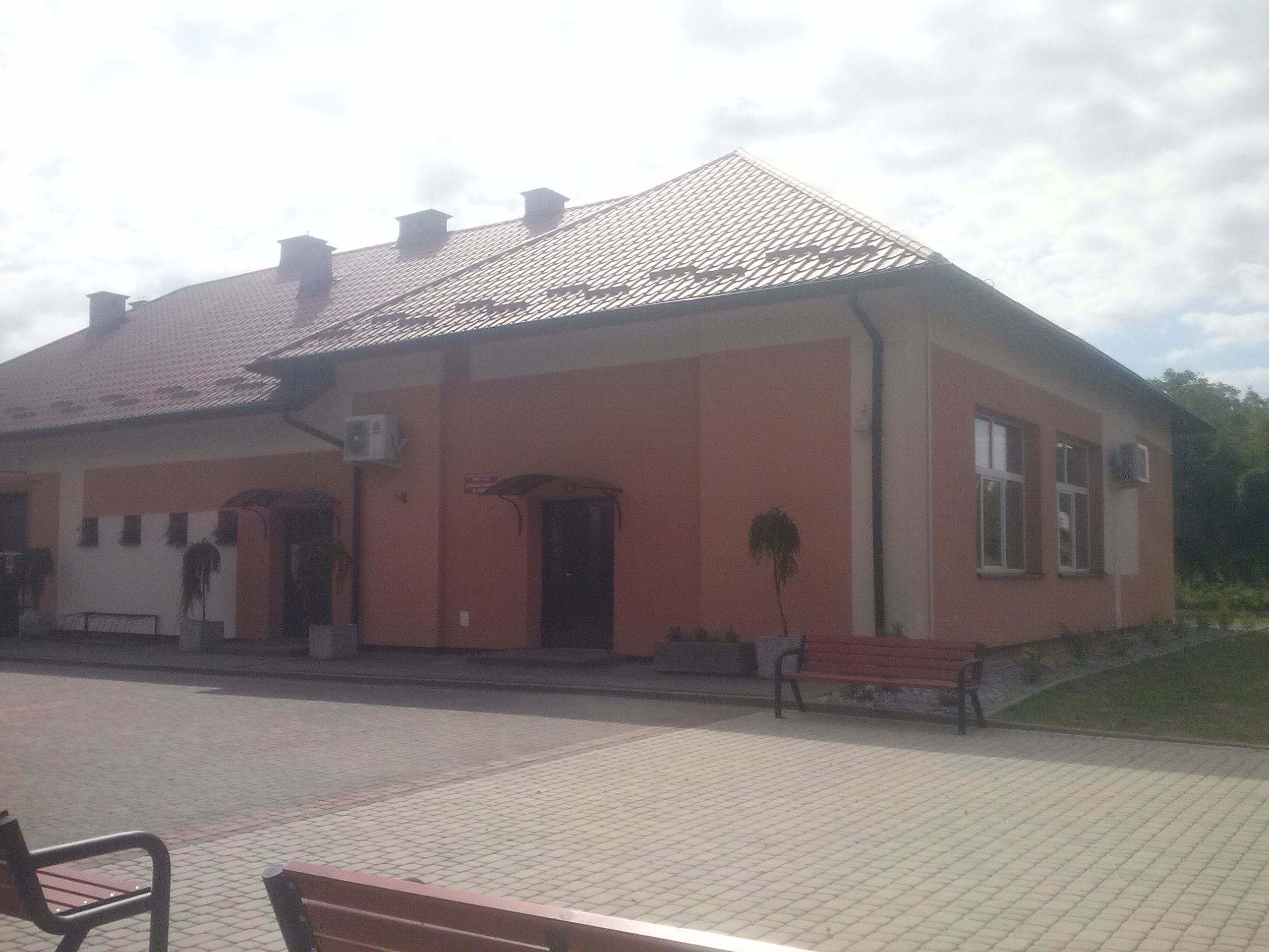 Gminny Ośrodek Kultury w Leżajsku filia w Dębnie